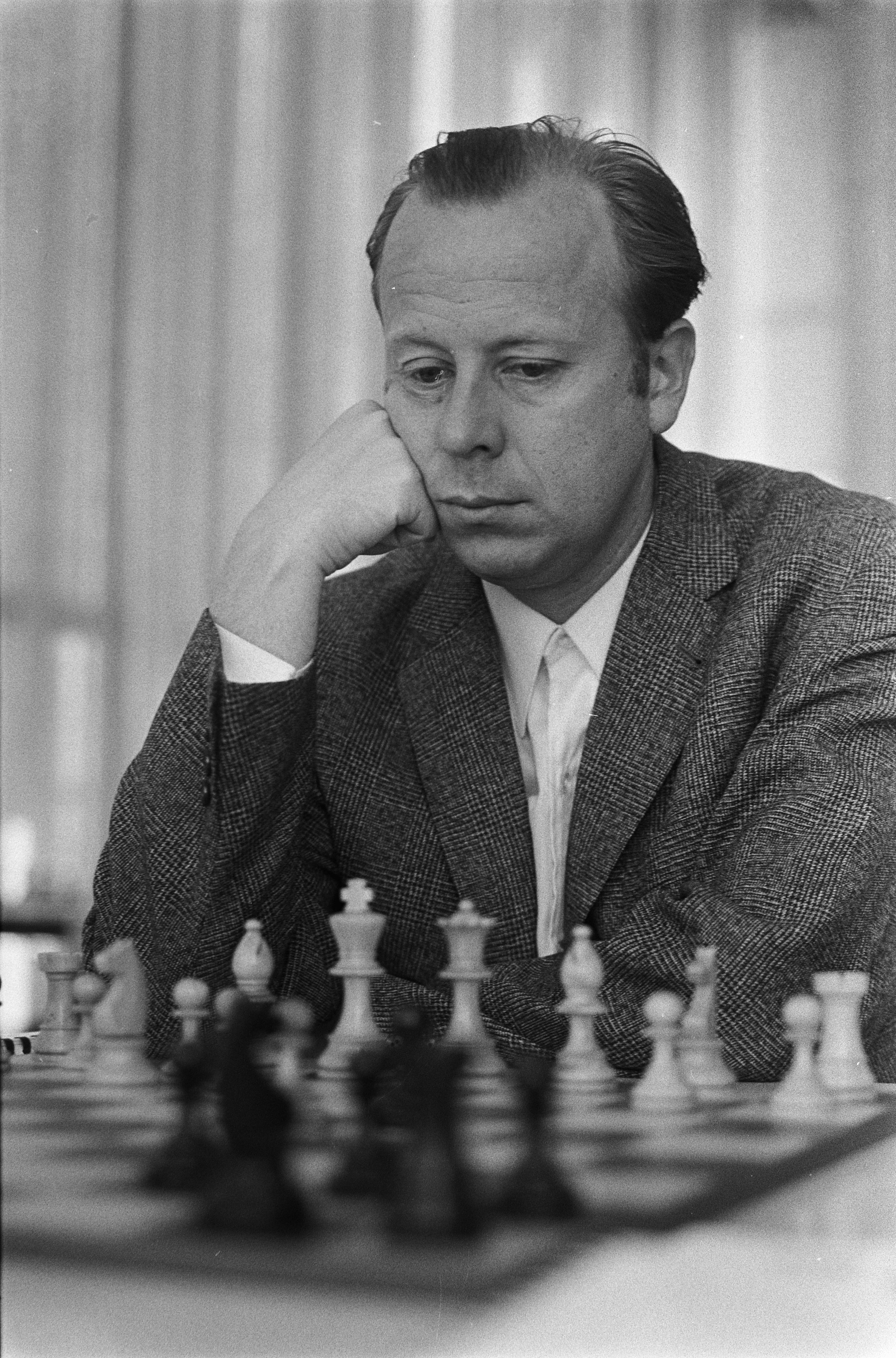 Collectie / Archief : Fotocollectie Anefo Reportage / Serie : [ onbekend ] Beschrijving : IBM-schaaktoernooi Datum : 22 juli 1970 Trefwoorden : schaken Instellingsnaam : IBM-Schaaktoernooi Fotograaf : Mieremet, Rob / Anefo Auteursrechthebbende : Nationaal Archief Materiaalsoort : Negatief (zwart/wit) Nummer archiefinventaris : bekijk toegang 2.24.01.05 Bestanddeelnummer : 923-6899